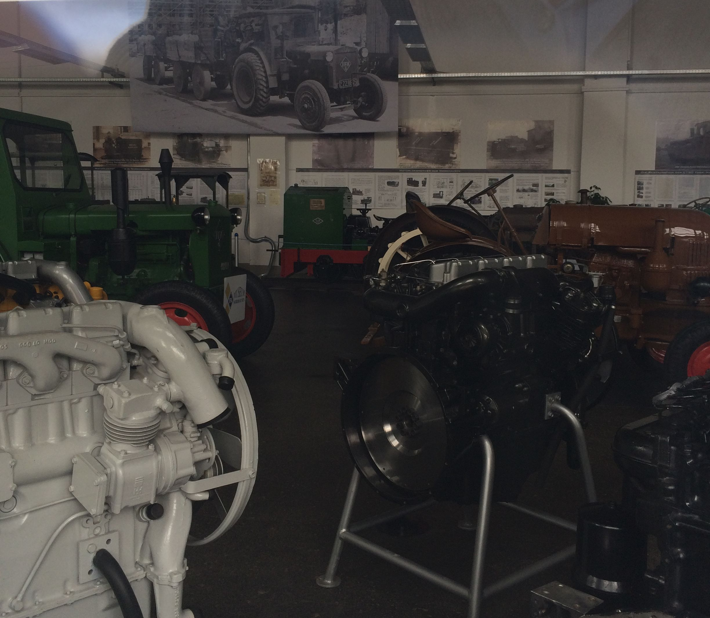 Traktoren und Schmalspurbahnlokomotive im IFA-Museum Nordhausen